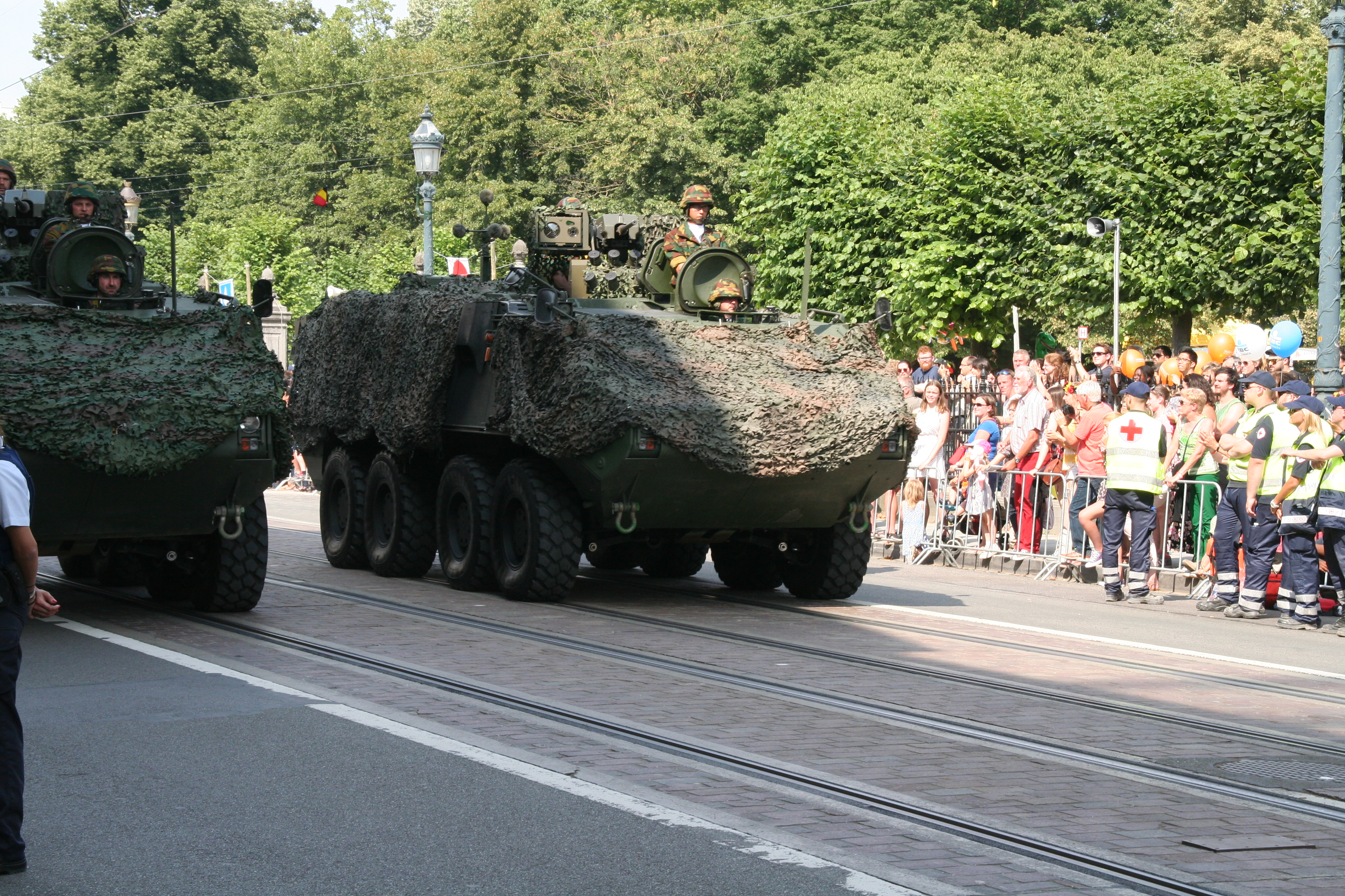 Fête nationale belge à Bruxelles le 21 juillet 2016 - Armée belge (Défense)